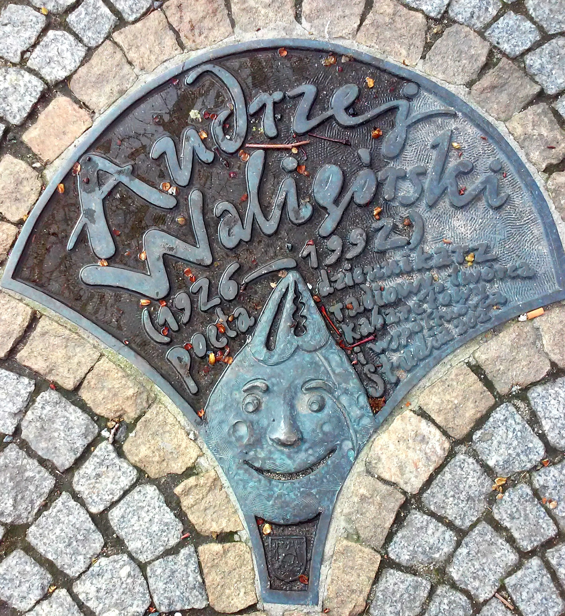 Legnica, Aleja Gwiazd Satyrykonu, tablica pamiątkowa - satyryk Andrzej Waligórski.